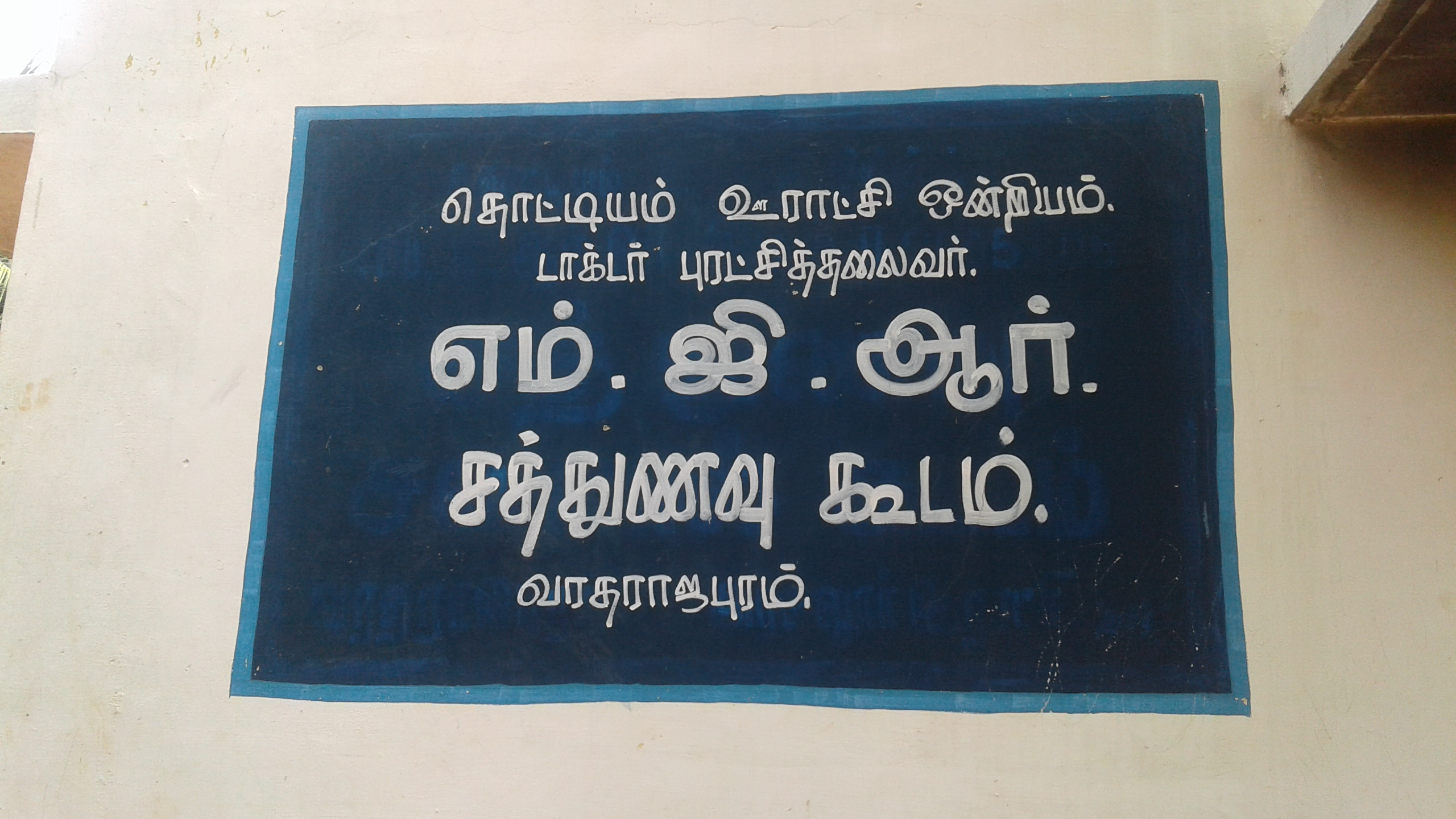 எம்.ஜி.ஆர் சத்துணவு திட்டம்